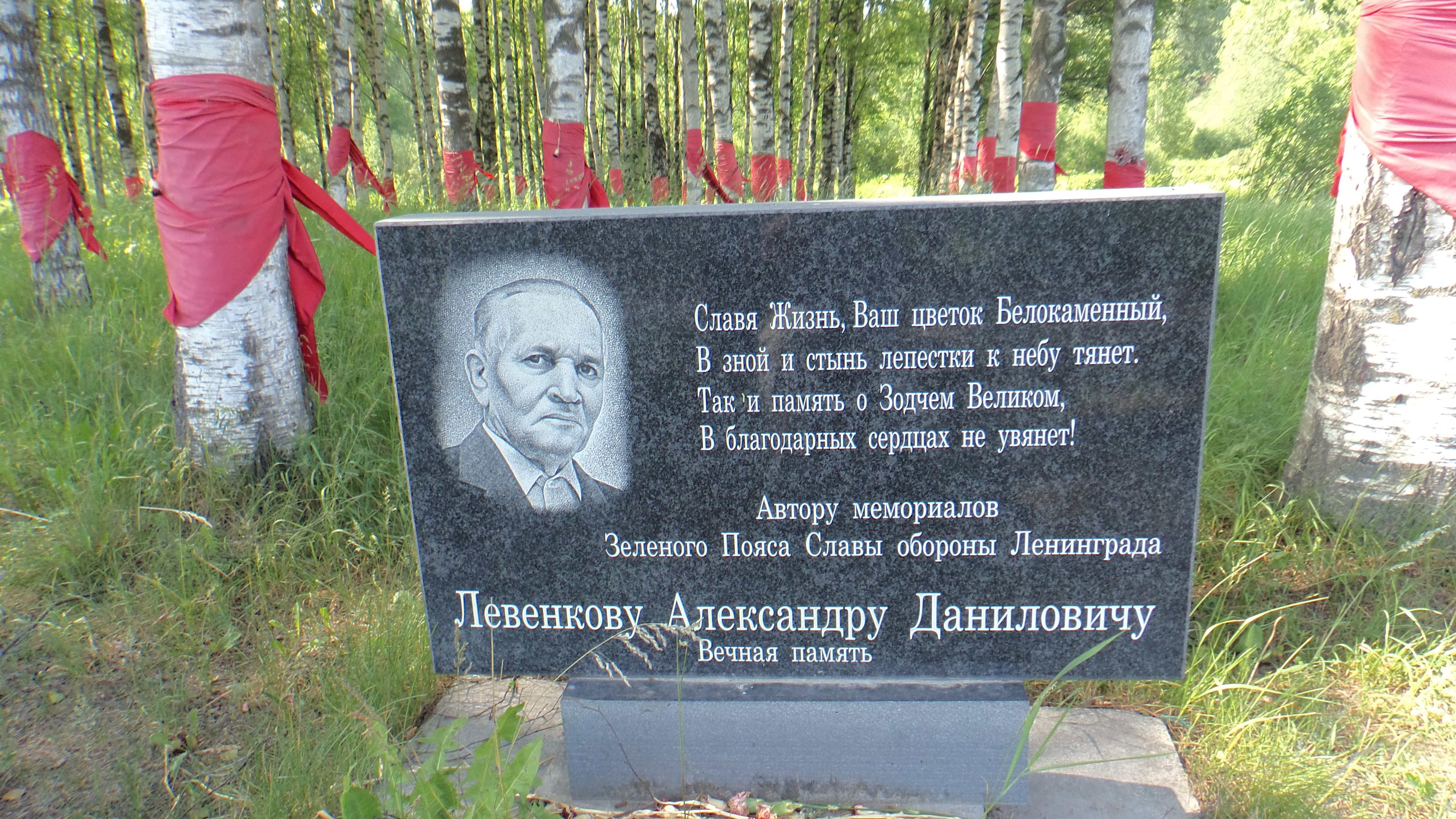 Мемориал в память обороны города в 1941-1944 гг. 'Зеленый пояс Славы Ленинграда' — памятник ленинградским детям 'Цветок жизни': 3 км "Дороги жизни", близ Ковалево, Всеволожский район, Ленинградская область